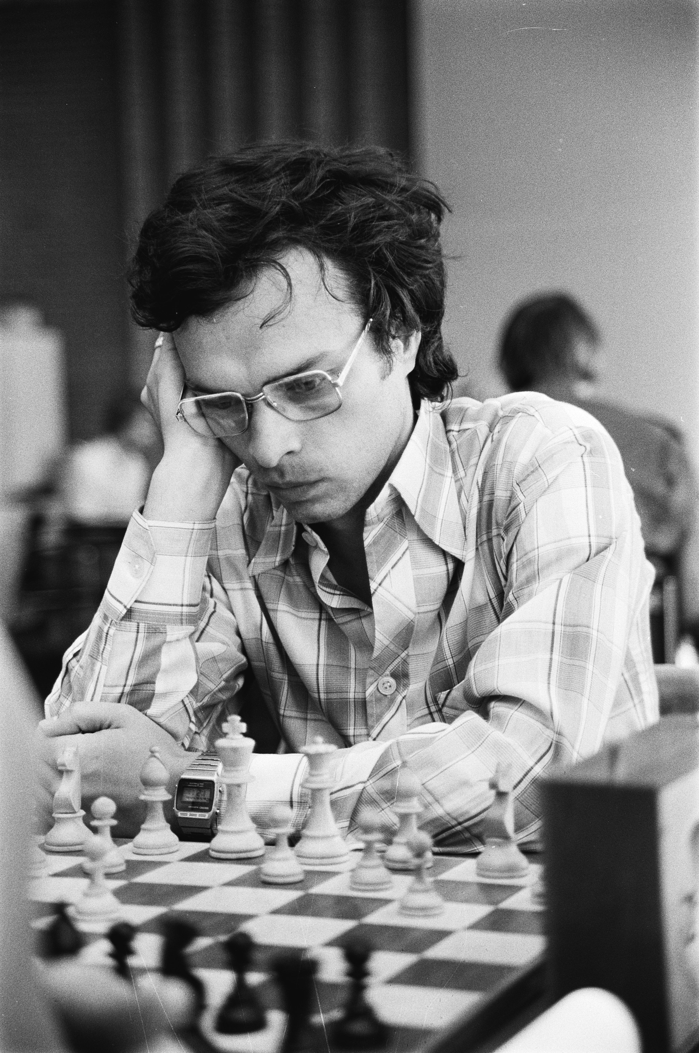 Gyula Sax